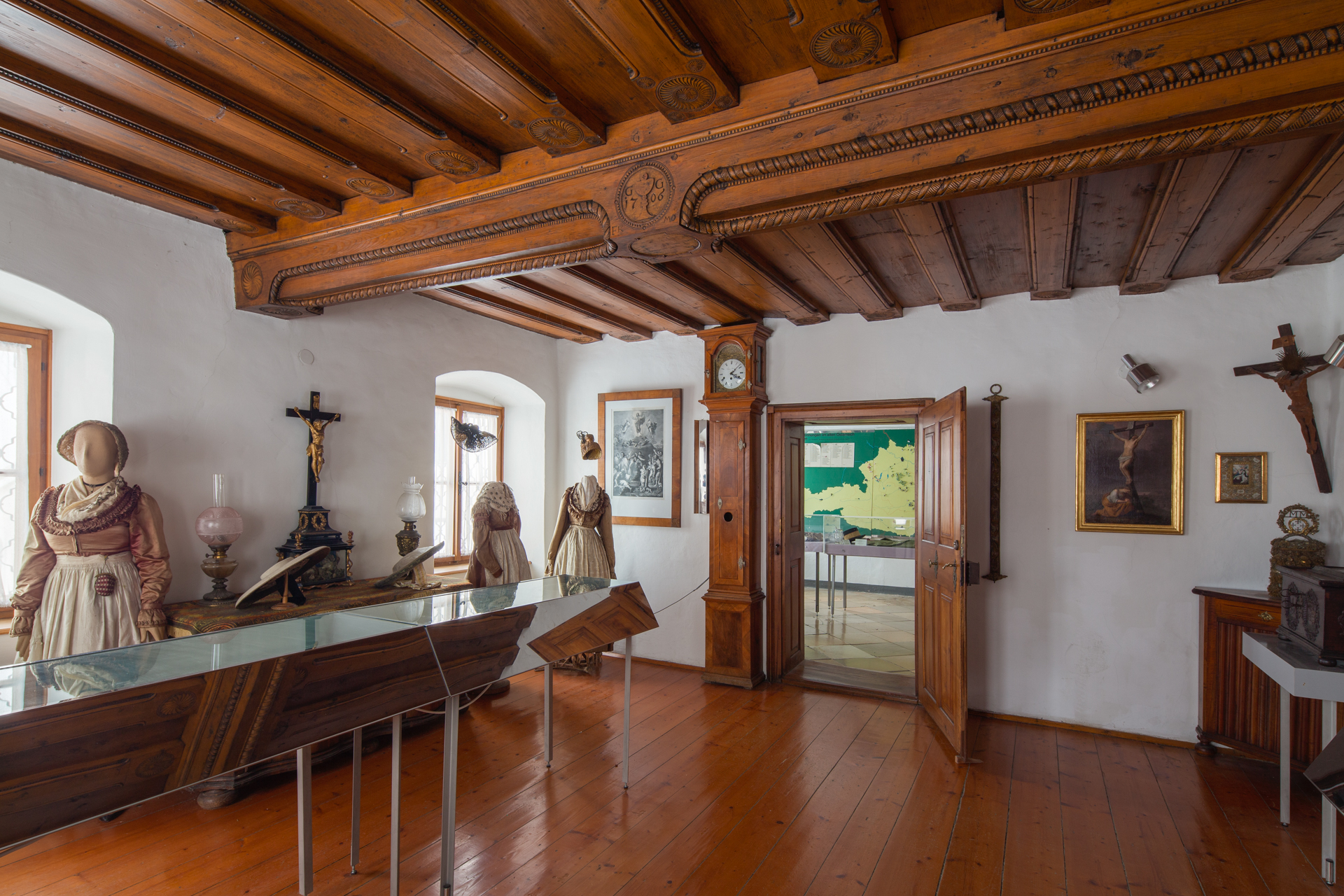 OÖ. Sensenschmiedemuseum in Micheldorf, Zunftzimmer. Reich geschnitzte barocke Balkendecke, deren Rüstbaum mit 1706 datiert ist und das Markenzeichen „Kelch mit Hostie“ sowie die Initialen „G G“ (für Georg Grätt) trägt.